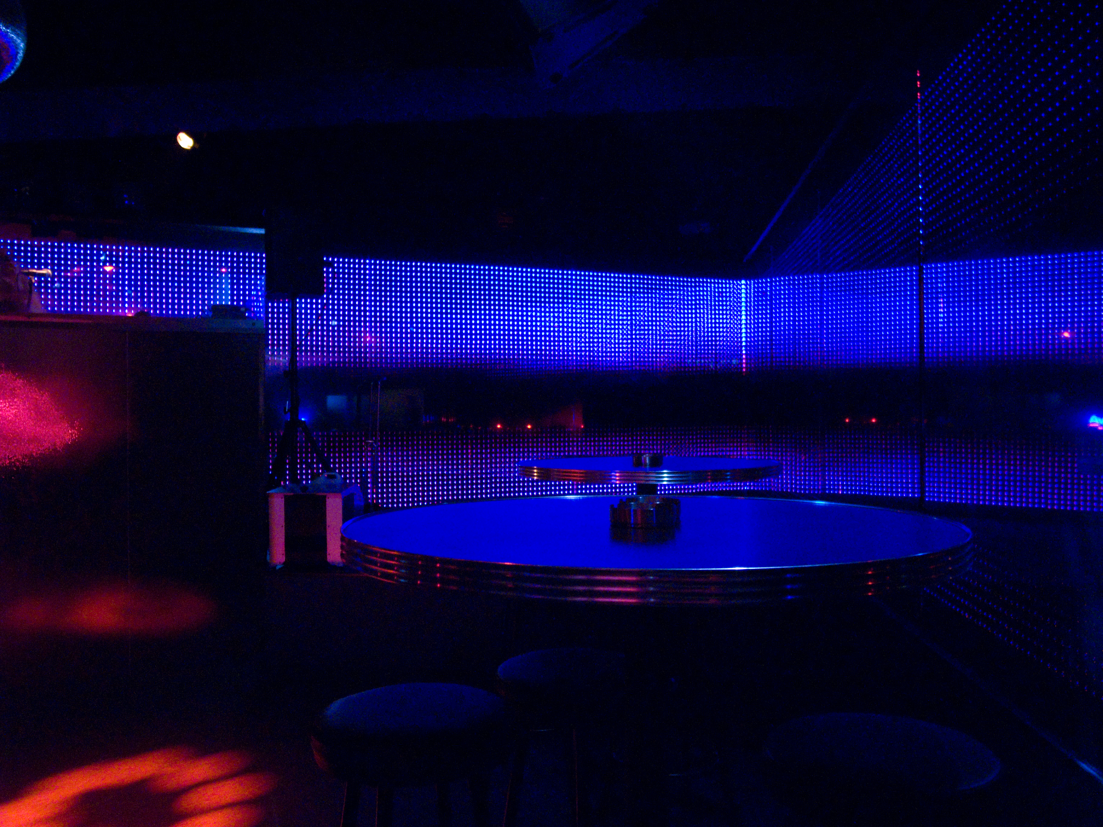 Es una pantalla LED en Tokio, Japón, similar a la usada por Coldplay en el video de la canción "Speed of Sound".